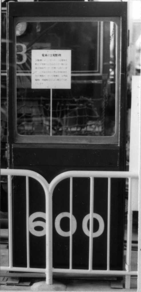 保存された600の貫通扉 1984.1.2 宝塚ファミリーランド電車館にて